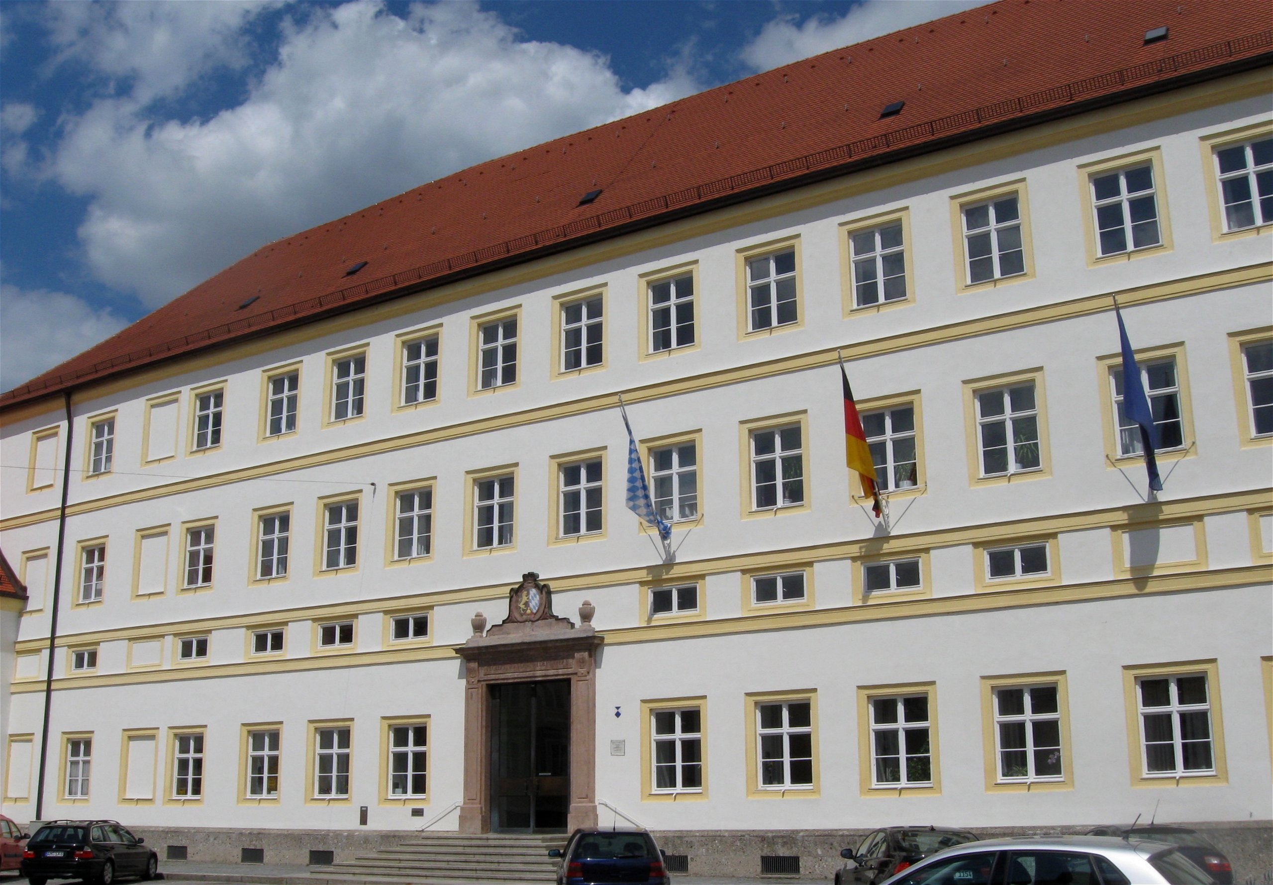 Regierungsplatz 540; Ehem. Dominikanerkloster, mit Resten alter Ausstattung (zum Teil aus der Passauer Residenz stammend), gegründet 1271 von Herzog Heinrich d. Ä. von Niederbayern, aufgehoben 1802, von 1802-1826 bayerische Landesuniversität, 1839- 1932 und seit 1956 wiederum Sitz der Regierung von Niederbayern; dreigeschossige Dreiflügelanlage, die sich an die Nordseite der Kirche anschließt, erbaut ab 1699; ehem. Anatomisches Institut, jetzt Staatsoberkasse, zweigeschossiger, klassizistischer Walmdachbau, 1803/04; sog. Ursulinenflügel des Regierungsgebäudes, einst Wirtschaftstrakt dieses Klosters, barock, um 1700; ehem. Wehrturm der Stadtmauer im Dominikanergarten, mittelalterlich, Anfang 19. Jahrhundert, ausgebaut als Palmenhaus; ehem. Dominikanerklosterkirche, dreischiffige Basilika mit einschiffigem Chor, im Kern frühgotisch, Dachwerk über Chor 1291 (dendro. dat.) und Dachwerk über Hauptschiff des Laienhauses 1340 (dendro. dat.), Umgestaltung des Inneren durch Johann Baptist Zimmermann 1747-1752, Westfassade klassizistisch verändert 1804; mit Ausstattung; ehem. Mariahilf-Kapelle und ehem. Magdalenenkapelle, im Kern gotisch, barock verändert, dienen jetzt der russisch-orthodoxen Gemeinde (St.-Nikolaus-Kirche); mit Ausstattung. D-2-61-000-450